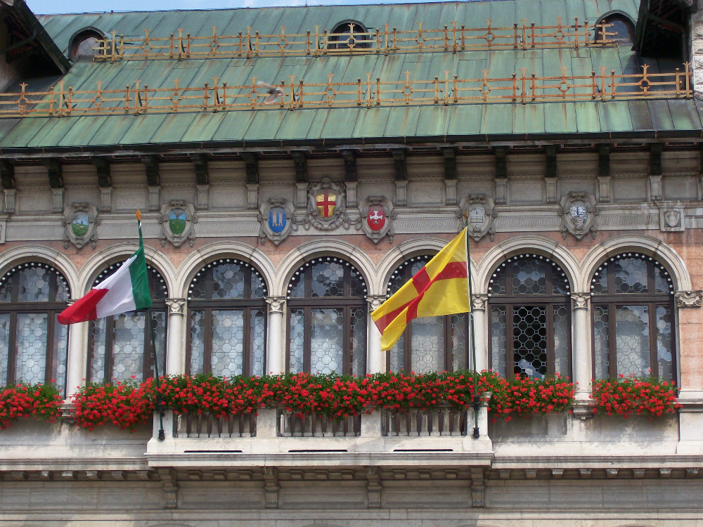 I sette stemmi dei comuni appartenenti alla Federazione dei 7 Comuni murati sulla facciata del Municipio di Asiago.